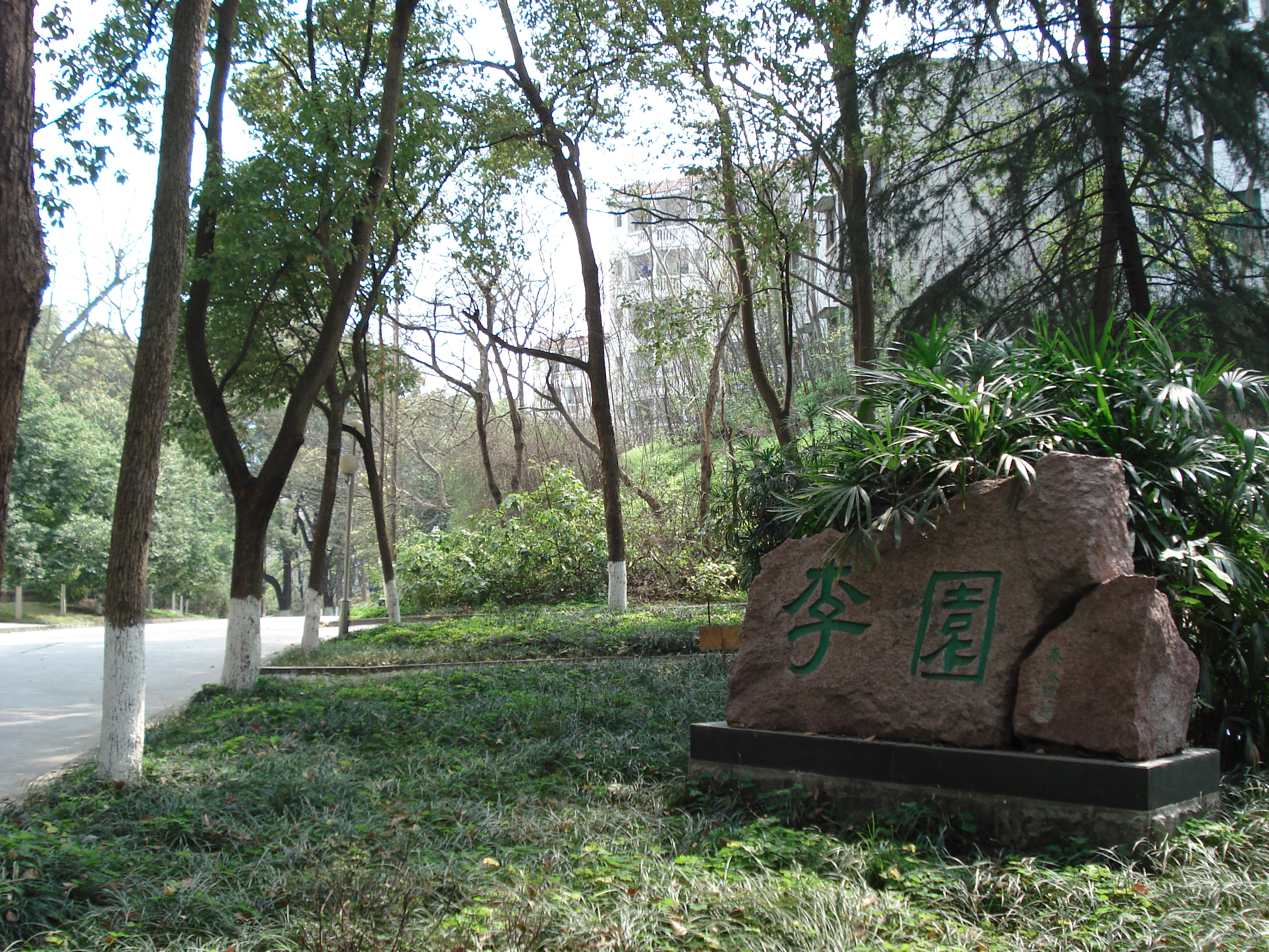 重慶市西南大學李園學生園區